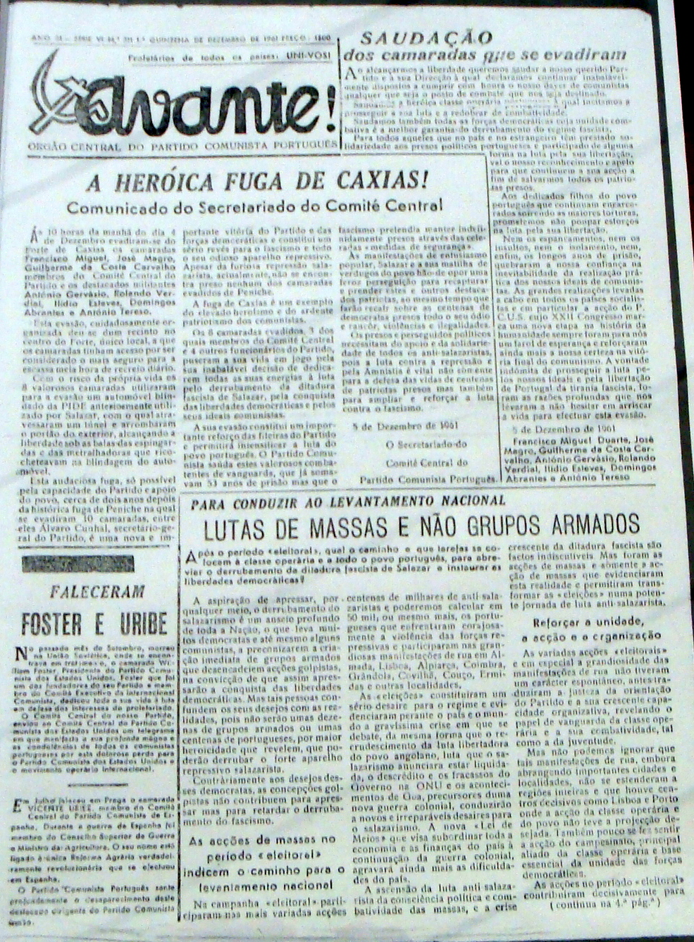 Primeira página do jornal Avante noticiando a fuga da prisão de Caxias de diversos dirigentes do Partido Comunista Português